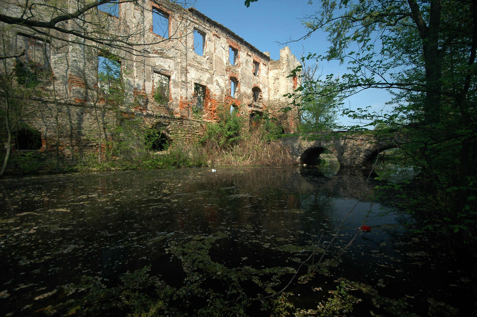 pałac w Pankowie, w gminie Świdnica